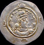 Pièce du règne de Bahram VI. Fabienkhan